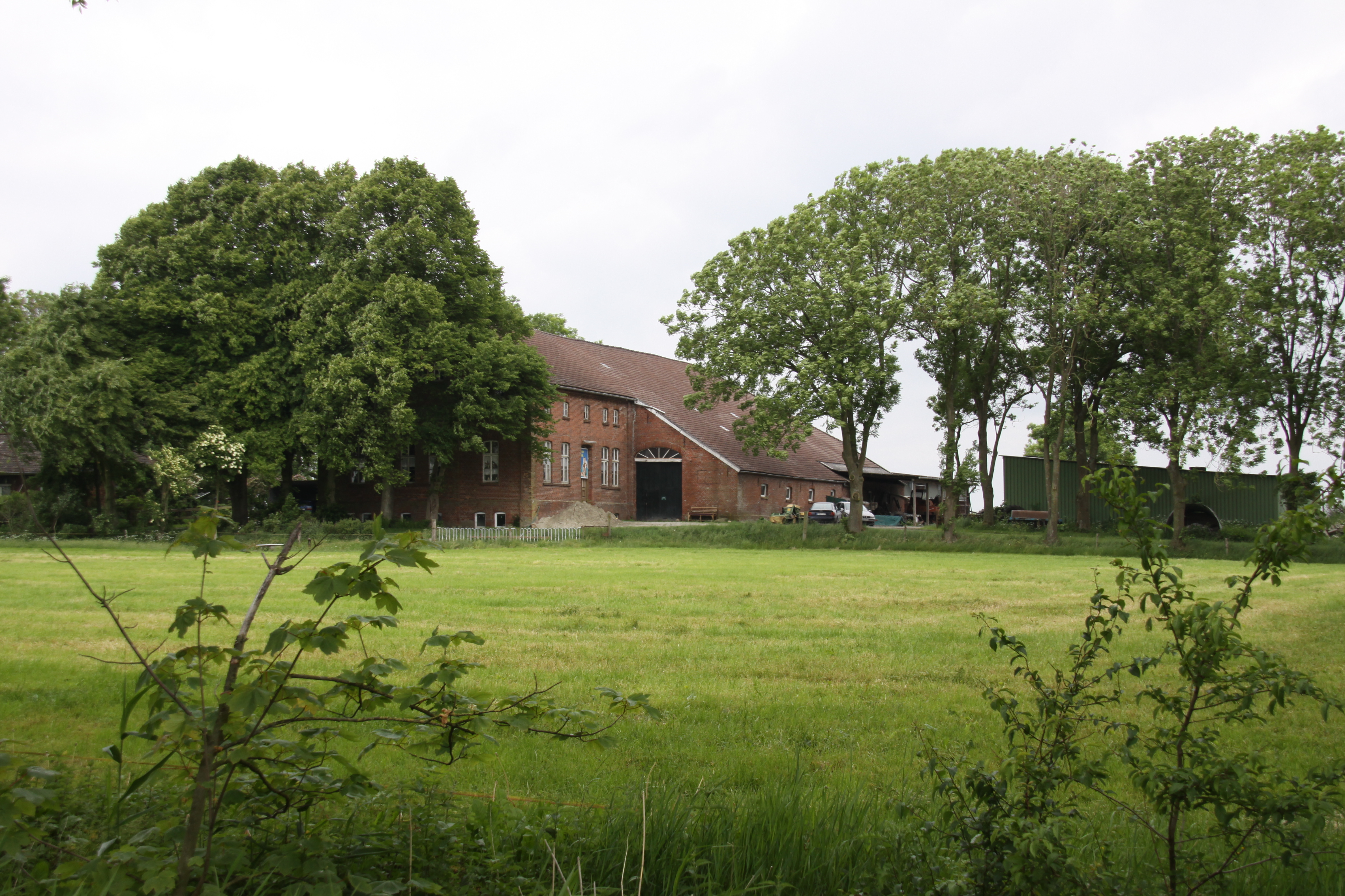 Kloster Blauhaus - heute ein landwirtschaftlicher Betrieb